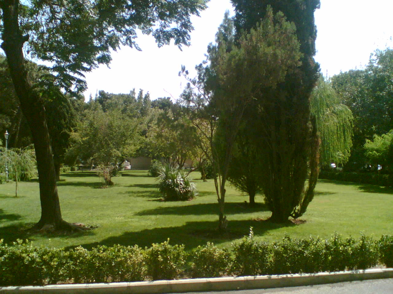 Intérieur du Park-e Shahr